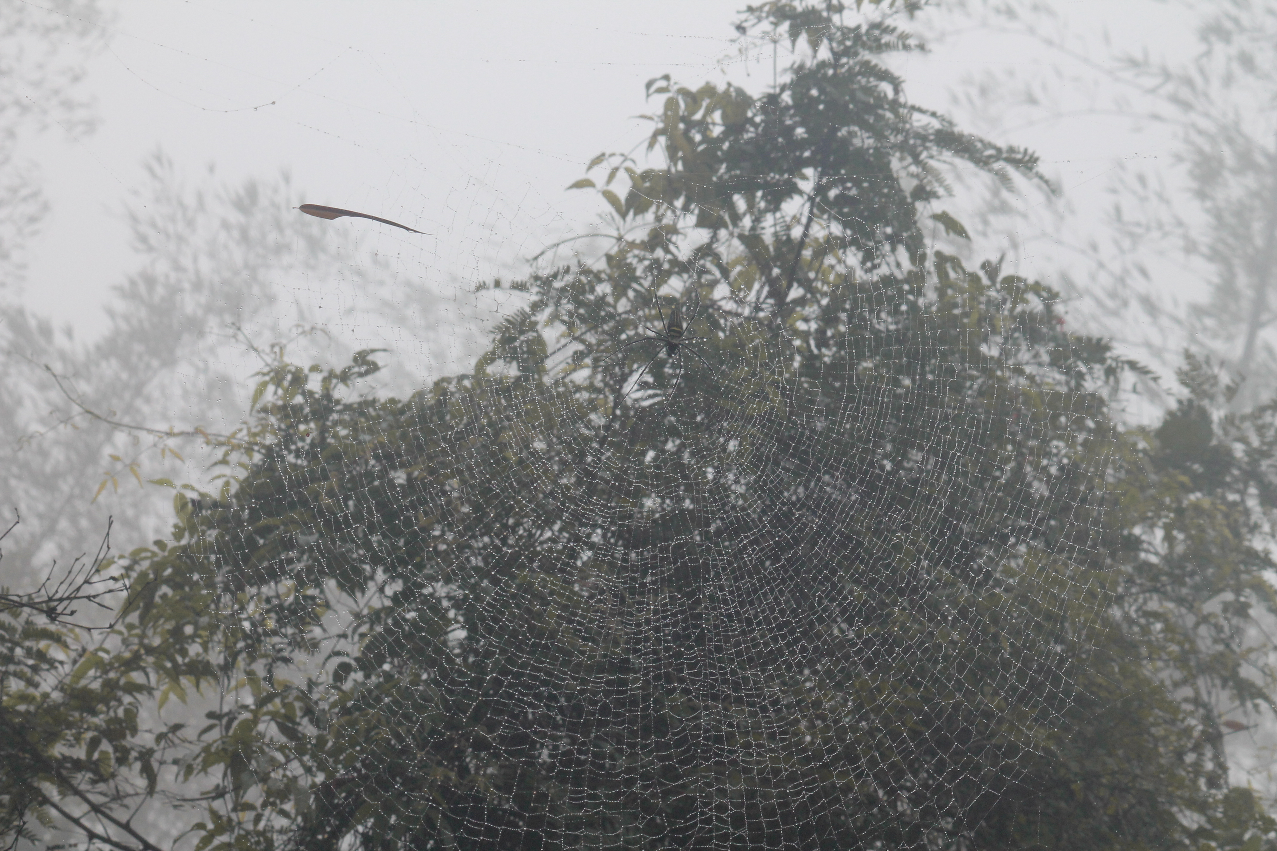 ഗോൾഡൻ സിൽക് ഓർബ്-വീവറിന്റെ വല. ഇത് രണ്ടുമീറ്ററോളം വീതിയുണ്ടായിരുന്നു.